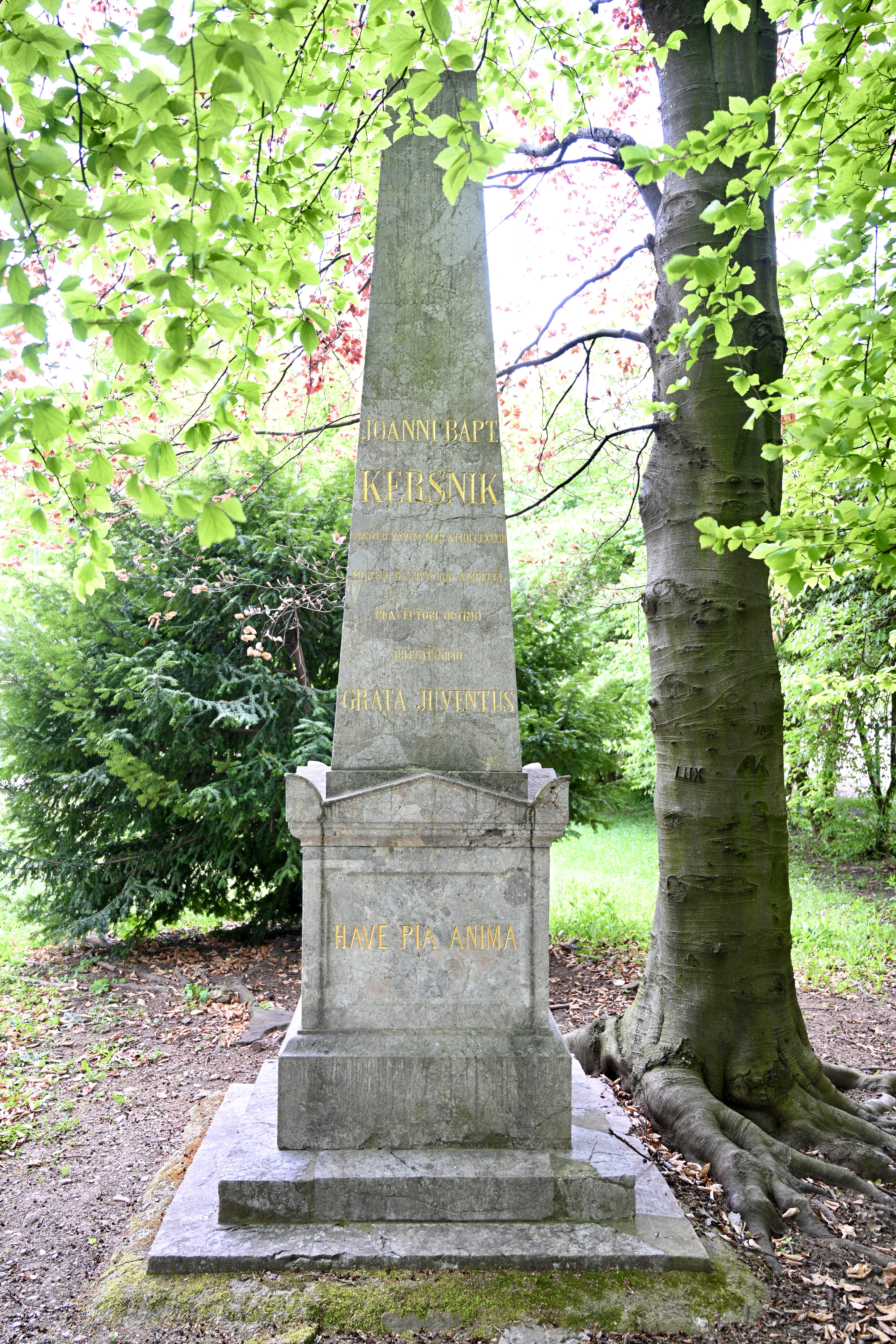 Nagrobnik Janeza Krstnika Kersnika, prvega slovenskega univerzitetnega profesorja fizike in kemije, na Navju v Ljubljani. Nagrobnik iz ihanskega marmorja so leta 1855 postavili Kersnikovi bivši učenci s posvetilom: praeceptori optimo dilectissimo grata iuventus - najboljšemu učitelju, nadvse spoštovanemu, hvaležna mladina.